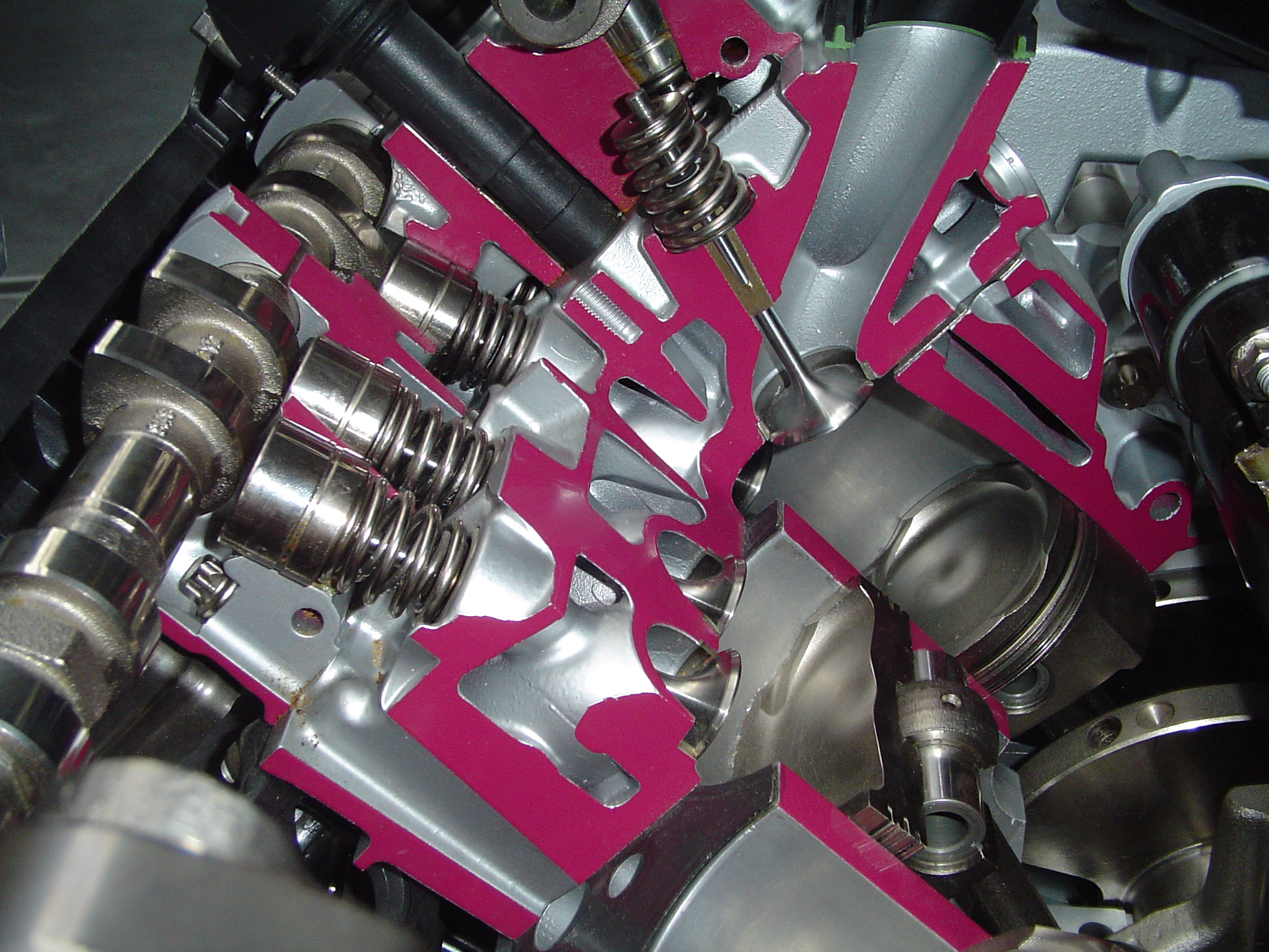 aufgenommen im Sächsischen Industriemuseum Chemnitz Nockenwelle, Ventilfedern, Ventile und Kolben / Porsche